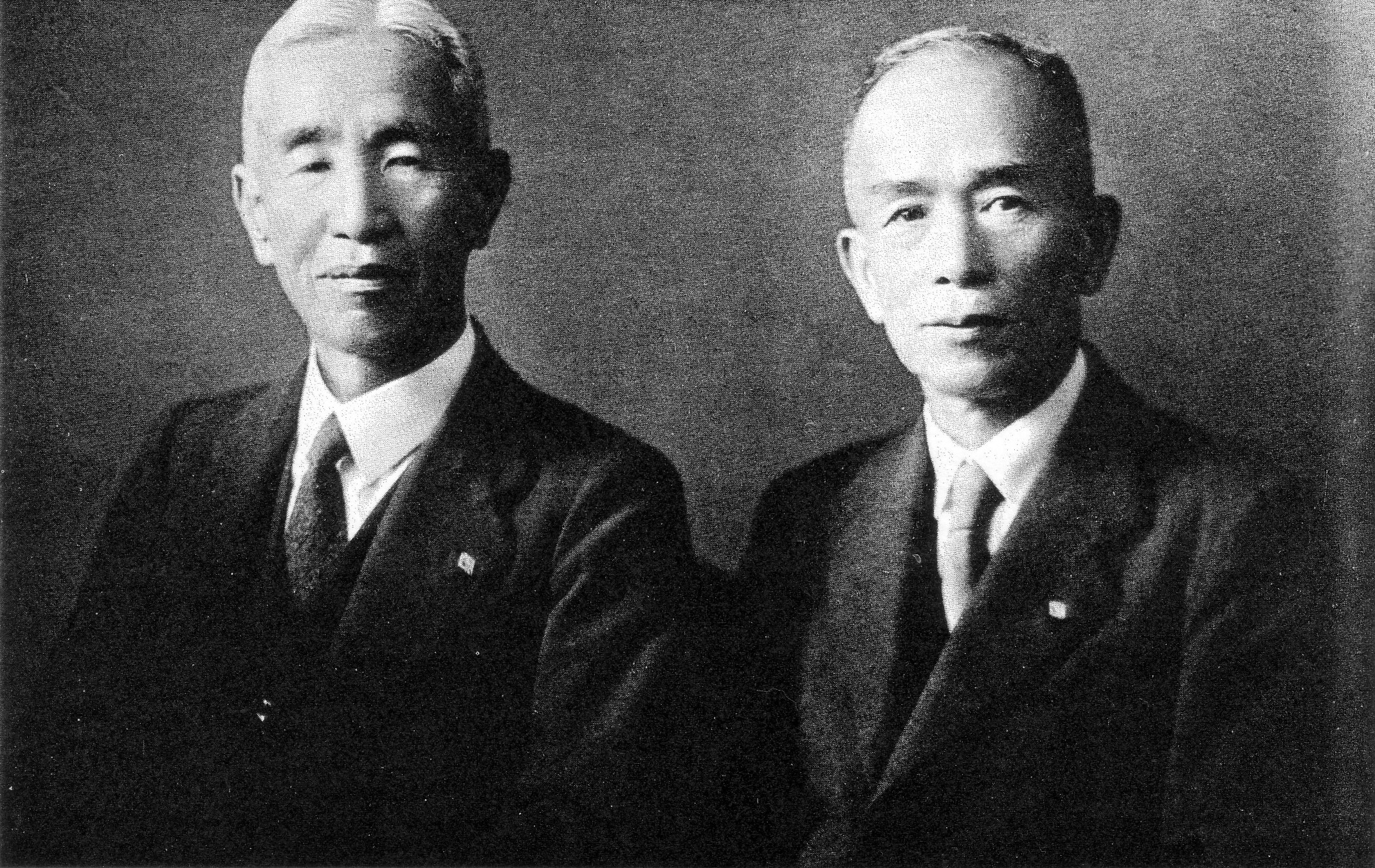 明治製菓の相馬半治会長と有嶋健助社長（当時）